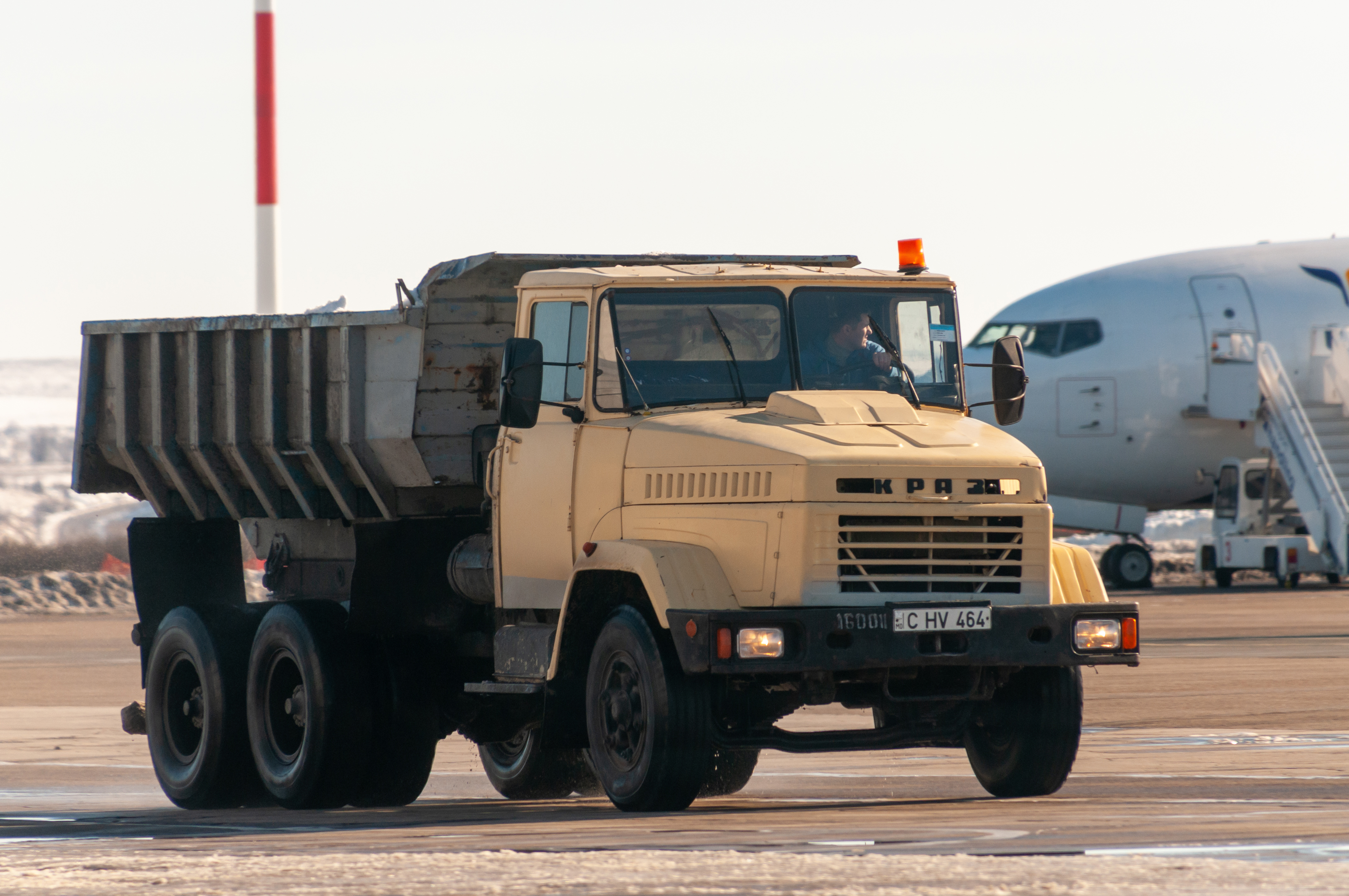 Chișinău, Moldawien, KrAS-6510 auf dem Flugplatz